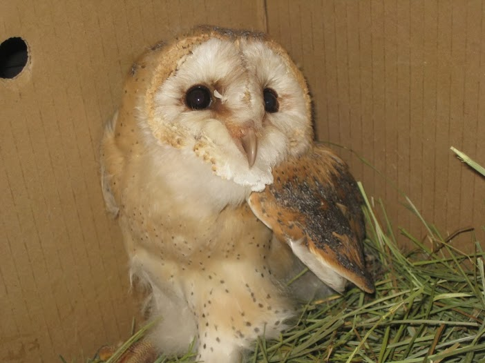 Imatge d'un exemplar d'ôliba (Tyto alba)